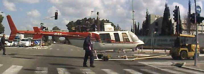 מסוק מובל למפעל התעשייה האווירית